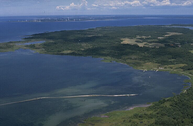 Naturreservatet Västlands i bildens mitt. Motiv: Västlands-området Nyckelord: Flygbilder, Naturreservat, Riksintressen Kategori: Kust- och skärgårdsmiljöNaturreservatet Västlands i bildens mitt.